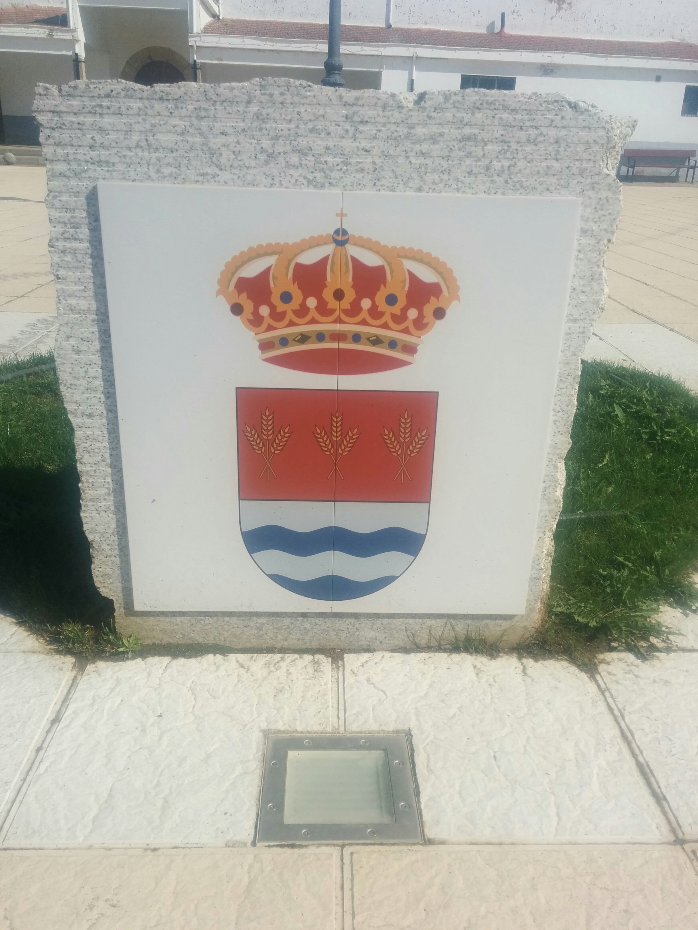 Escudo en placa de Urdiales del Páramo en la plaza de la iglesia del mismo municipio